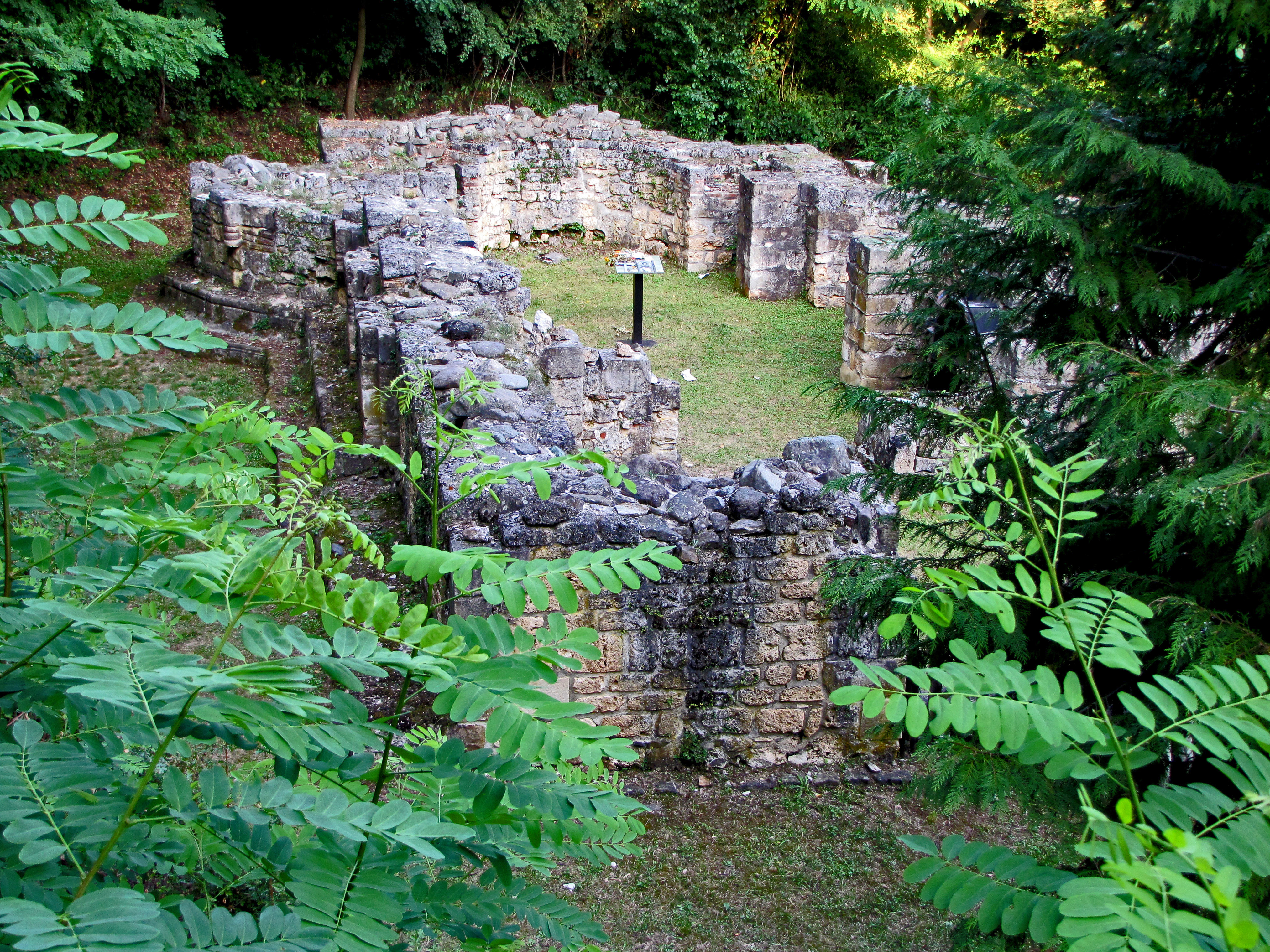 Манастир Милентија био је посвећен Светом Стефану, а његови остаци налазе се на два километра од центра истоименог села. Током археолошких истраживања остатака манастира Милентија пронађени су веома значајни предмети, међу којима и чувена розета, која је била изложена у Метрополитен музеју 2004. године.